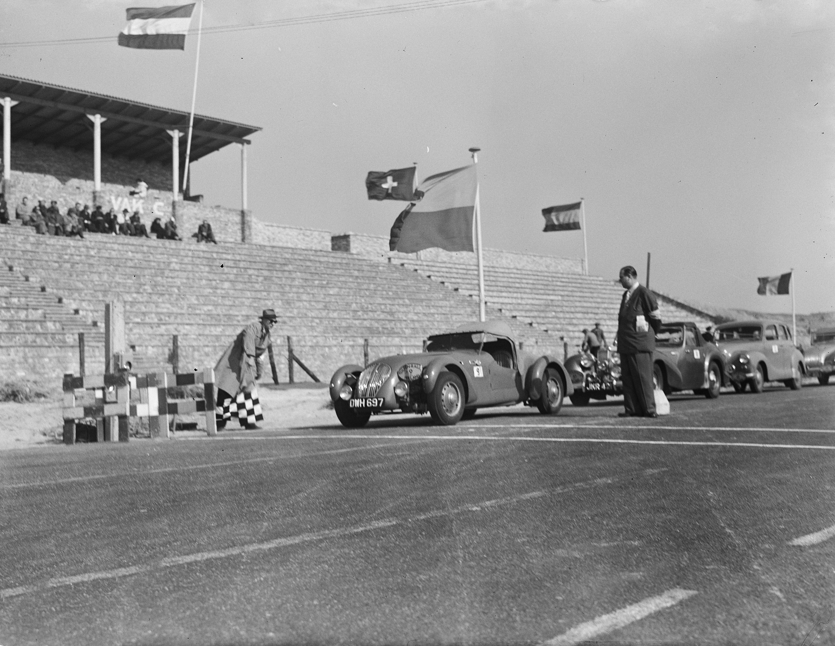 Collectie / Archief : Fotocollectie Anefo Reportage / Serie : [ onbekend ] Beschrijving : Klassementsrit van de Tulpenralley te Zandvoort Datum : 20 april 1950 Locatie : Noord-Holland, Zandvoort Trefwoorden : autosport Instellingsnaam : Tulpenrally Fotograaf : Pot, Harry / Anefo Auteursrechthebbende : Nationaal Archief Materiaalsoort : Glasnegatief Nummer archiefinventaris : bekijk toegang 2.24.01.09 Bestanddeelnummer : 903-9205